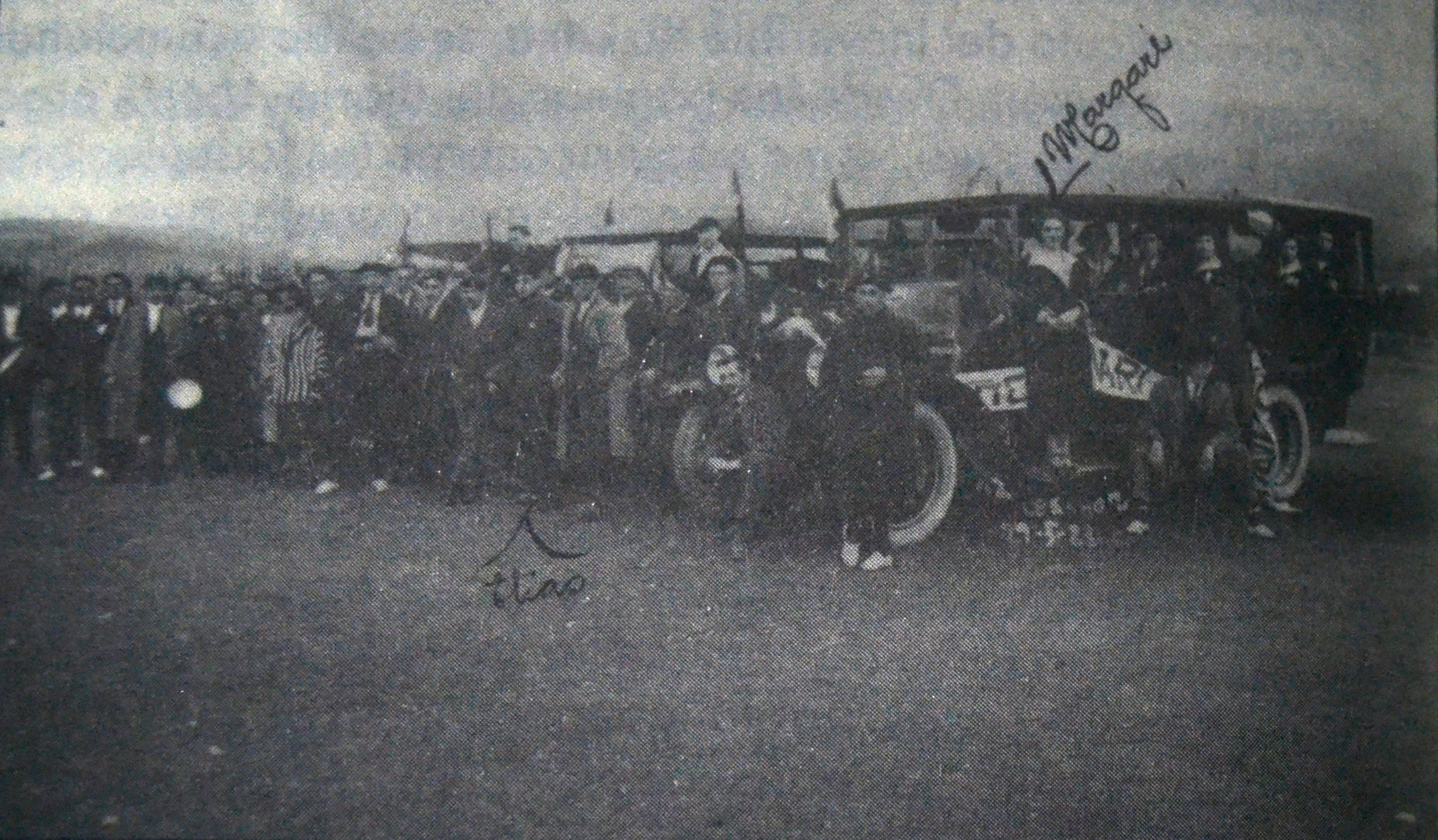 1923. Euzko Gaztegi talde abertzalearen antzerki taldeko kideak, 1923. urtean zehar herriz-herri "Pedro Mari" antzezlana taularatuz burututako biran zehar.